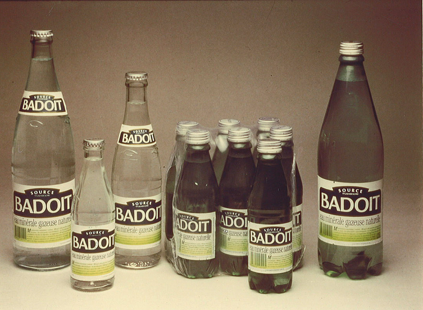 Les bouteilles Badoit sont équipées de bouchons à vis.